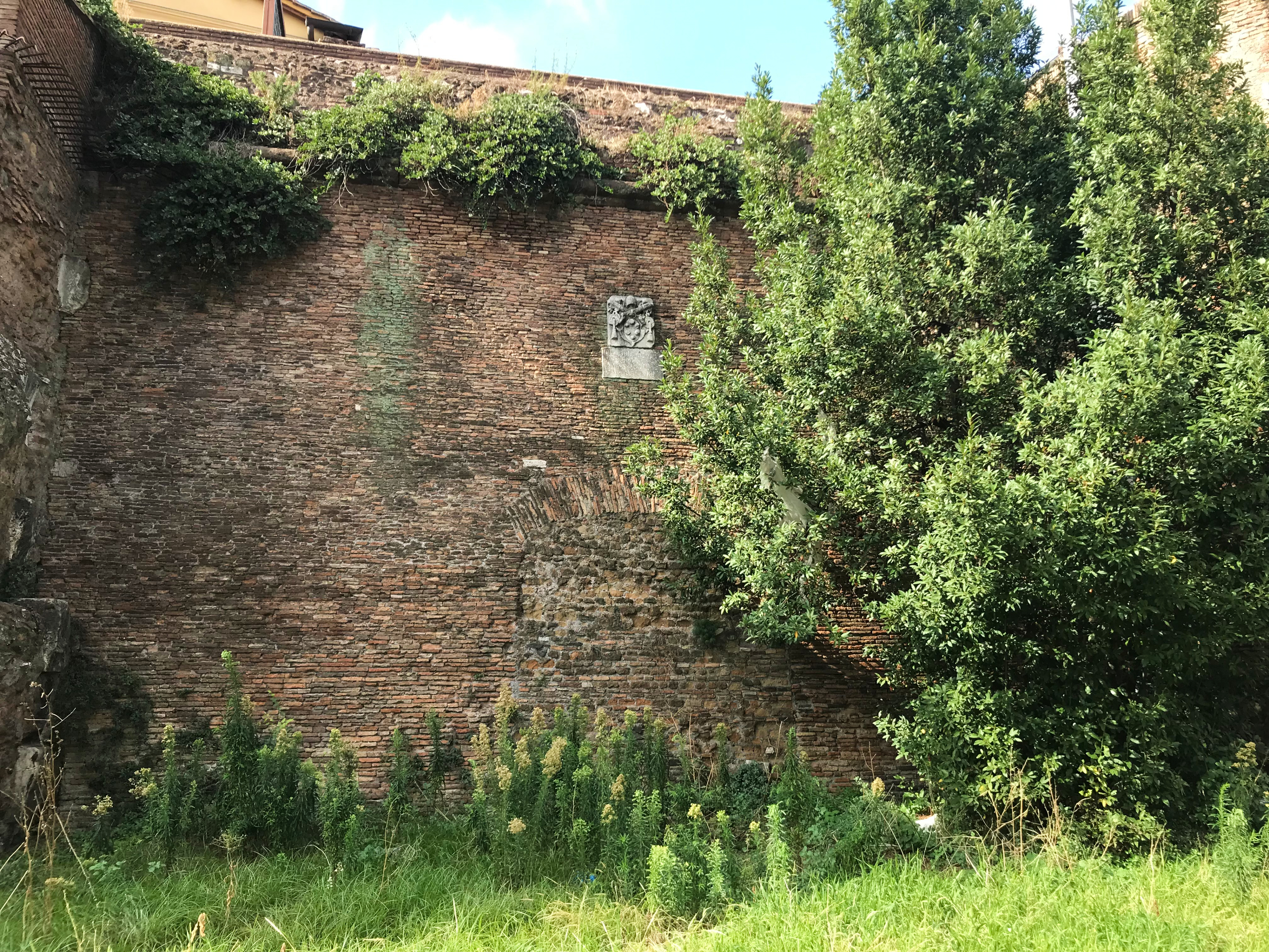 Porta Nomentana a Roma